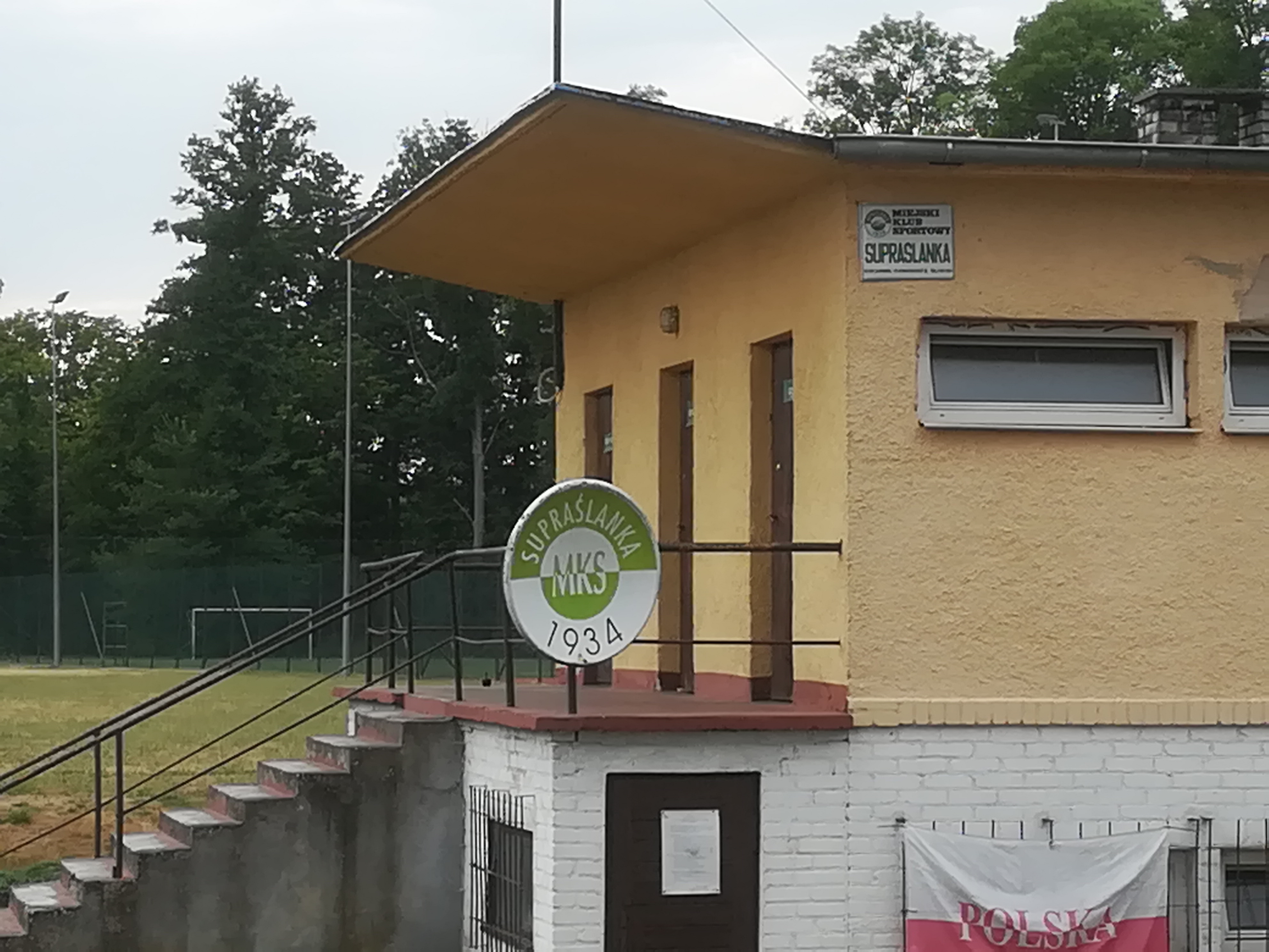 Supraślanka sadion